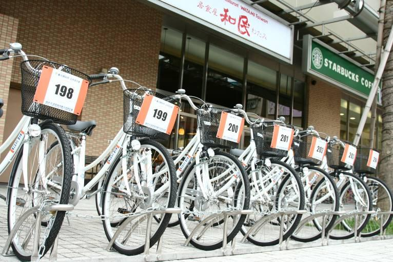 臺北縣政府公共自行車。